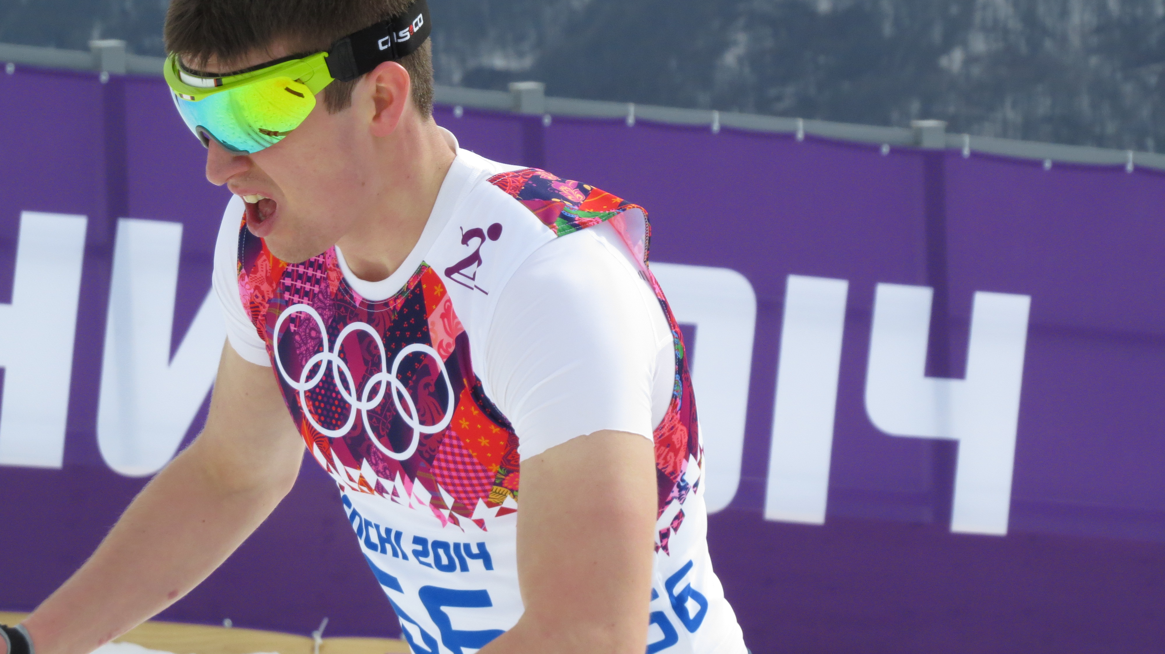 Лыжные гонки на зимних Олимпийских играх 2014 — 15 км классическим стилем (мужчины)